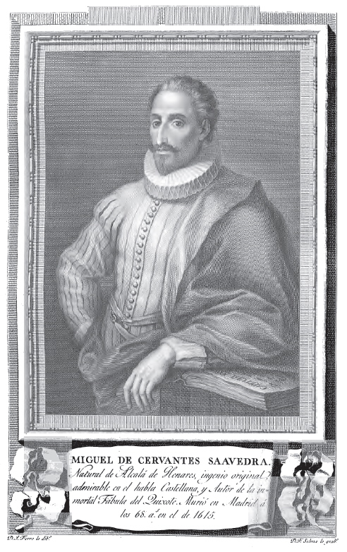 Retrato de Miguel de Cervantes Saavedra